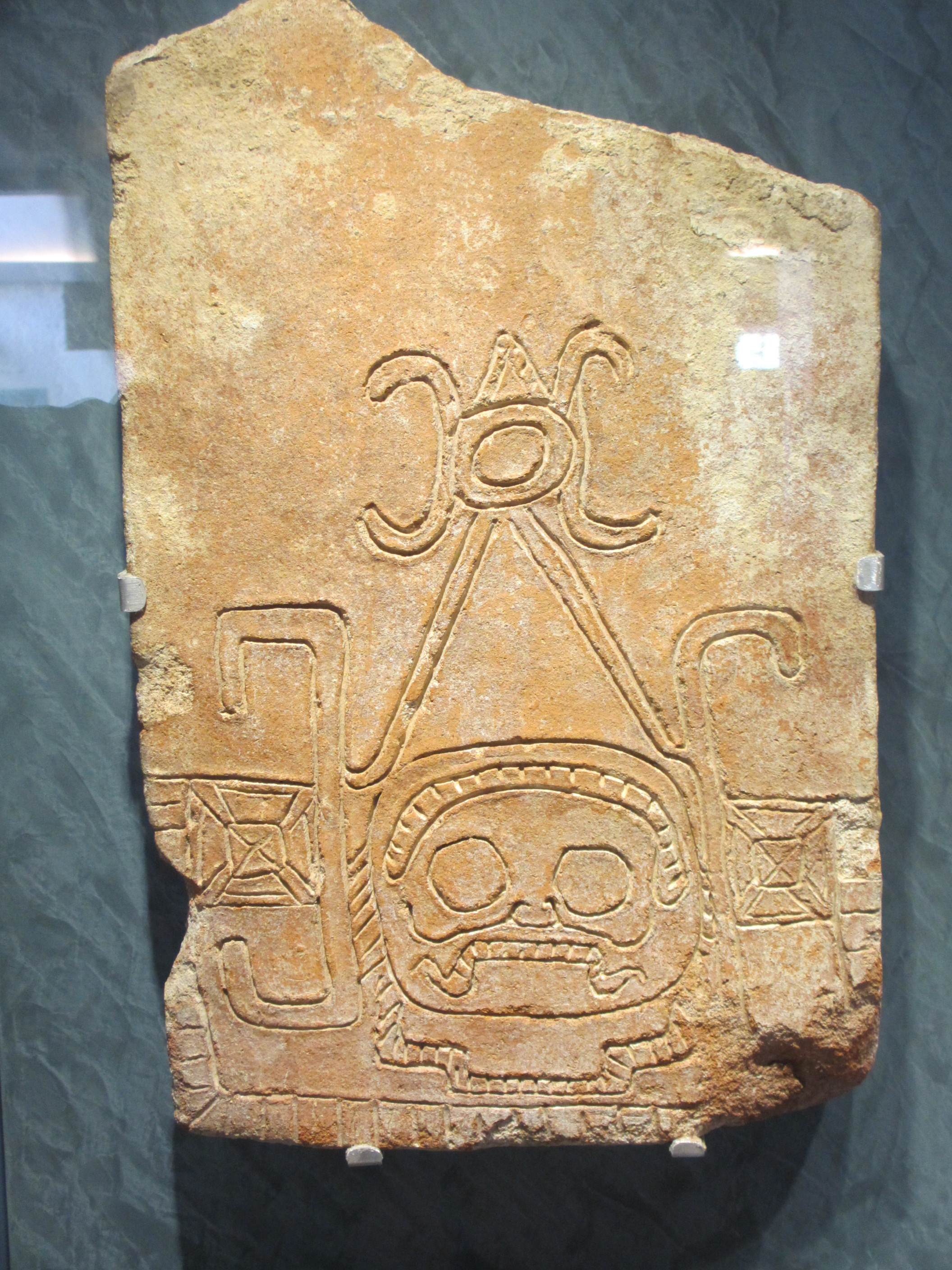 Ladrillo grabado con la imagen del dios del comercio Ek Chuah el cual aparece representado en muchos códices y se le reconoce por el "mecapal" que lleva a manera de tocado.